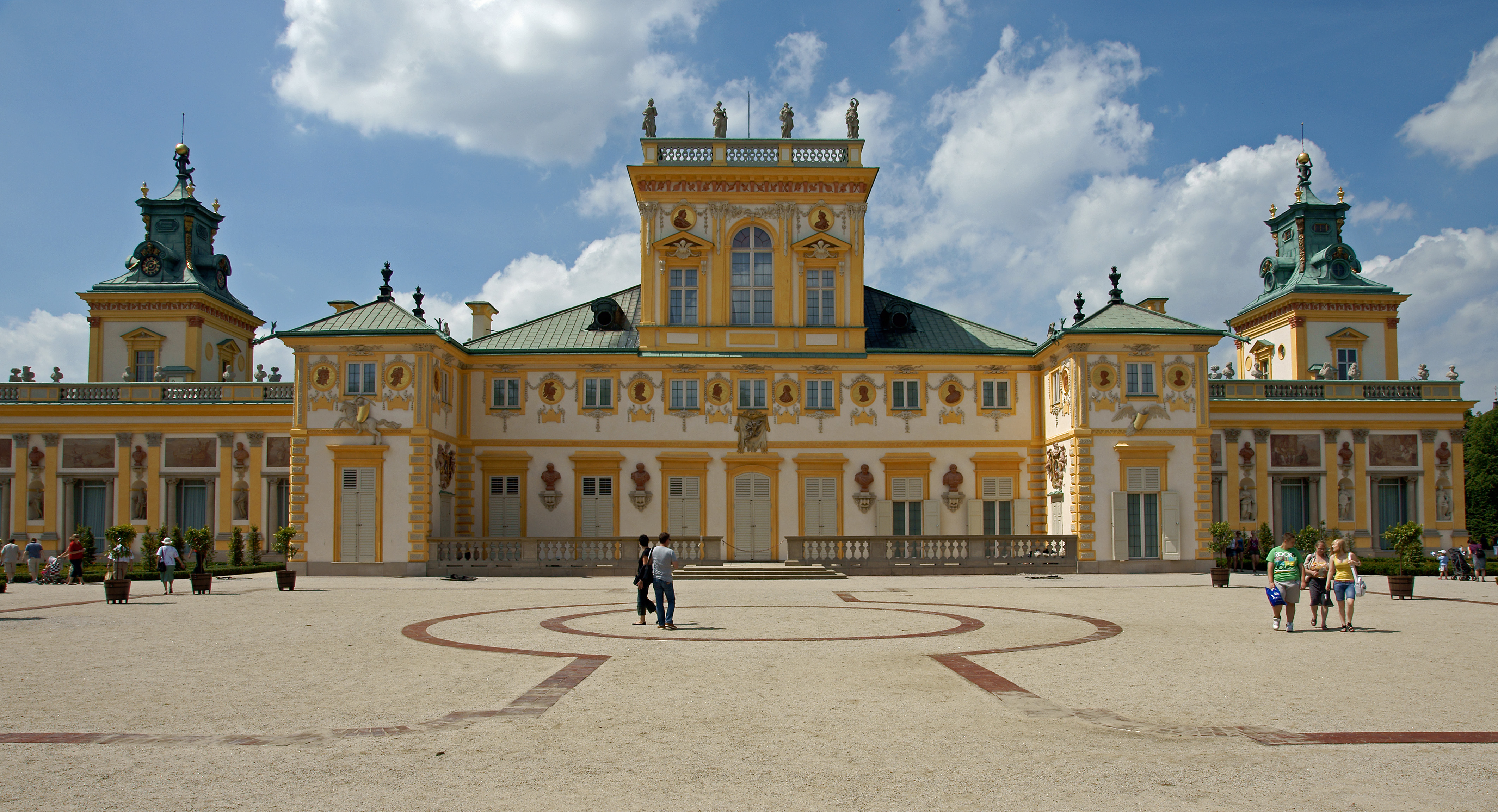 Widok na elewację wschodnią korpusu głównego i galerii pałacu w Wilanowie.